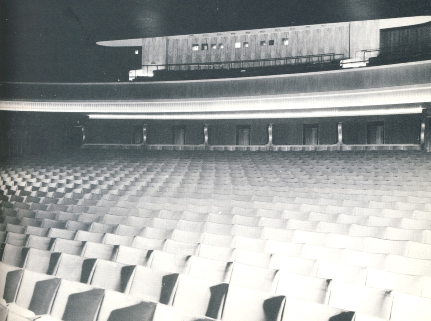 Biografen "Rigolettos" salong (Stockholm)